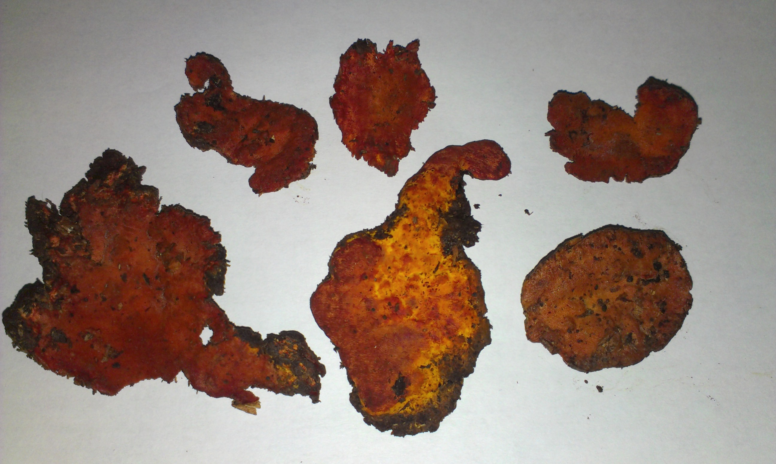 牛樟芝子實體。